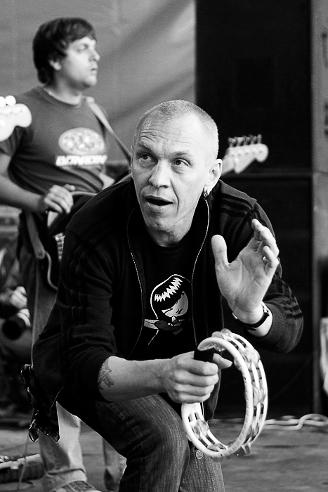 Александр Ф. Скляр на фестивале "Нашествие-2008". Автор фото - Александр Цверов.